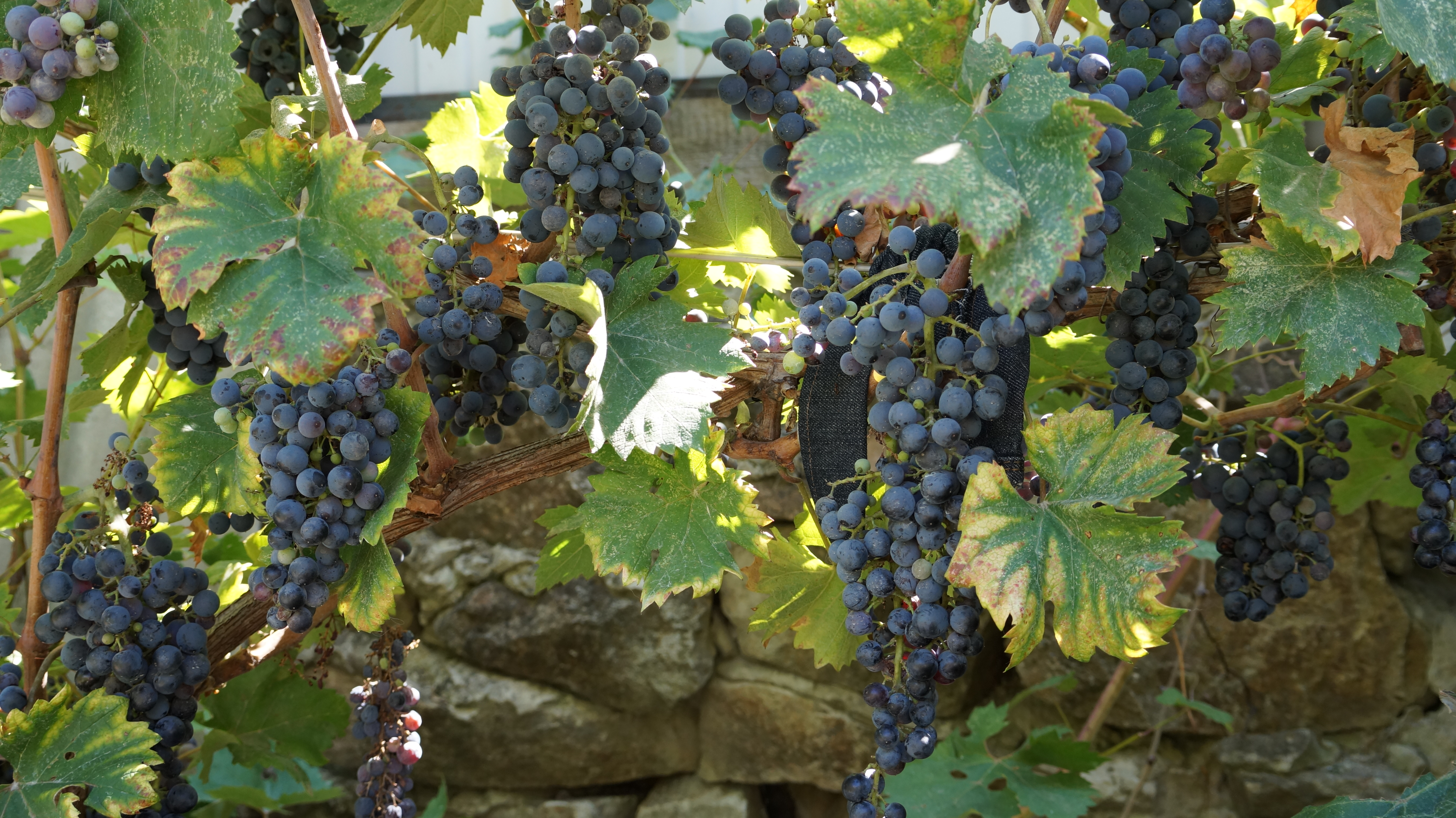 Цимлянский черный сорт винограда